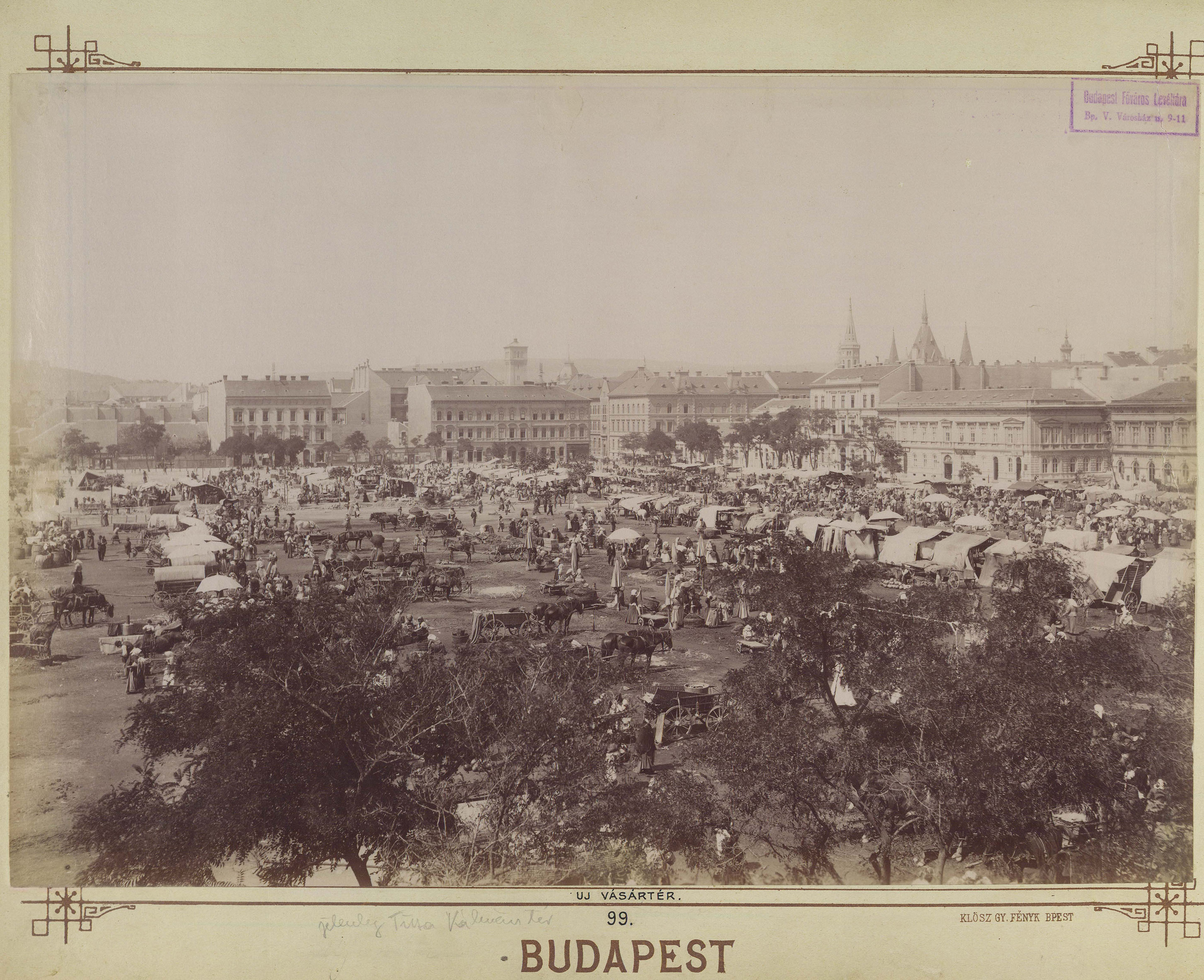 II. János Pál pápa (Új Vásár) tér. A felvétel 1895 után készült. A kép forrását kérjük így adja meg: Fortepan / Budapest Főváros Levéltára. Levéltári jelzet: HU.BFL.XV.19.d.1.07.100 Location: Hungary, Budapest VIII.